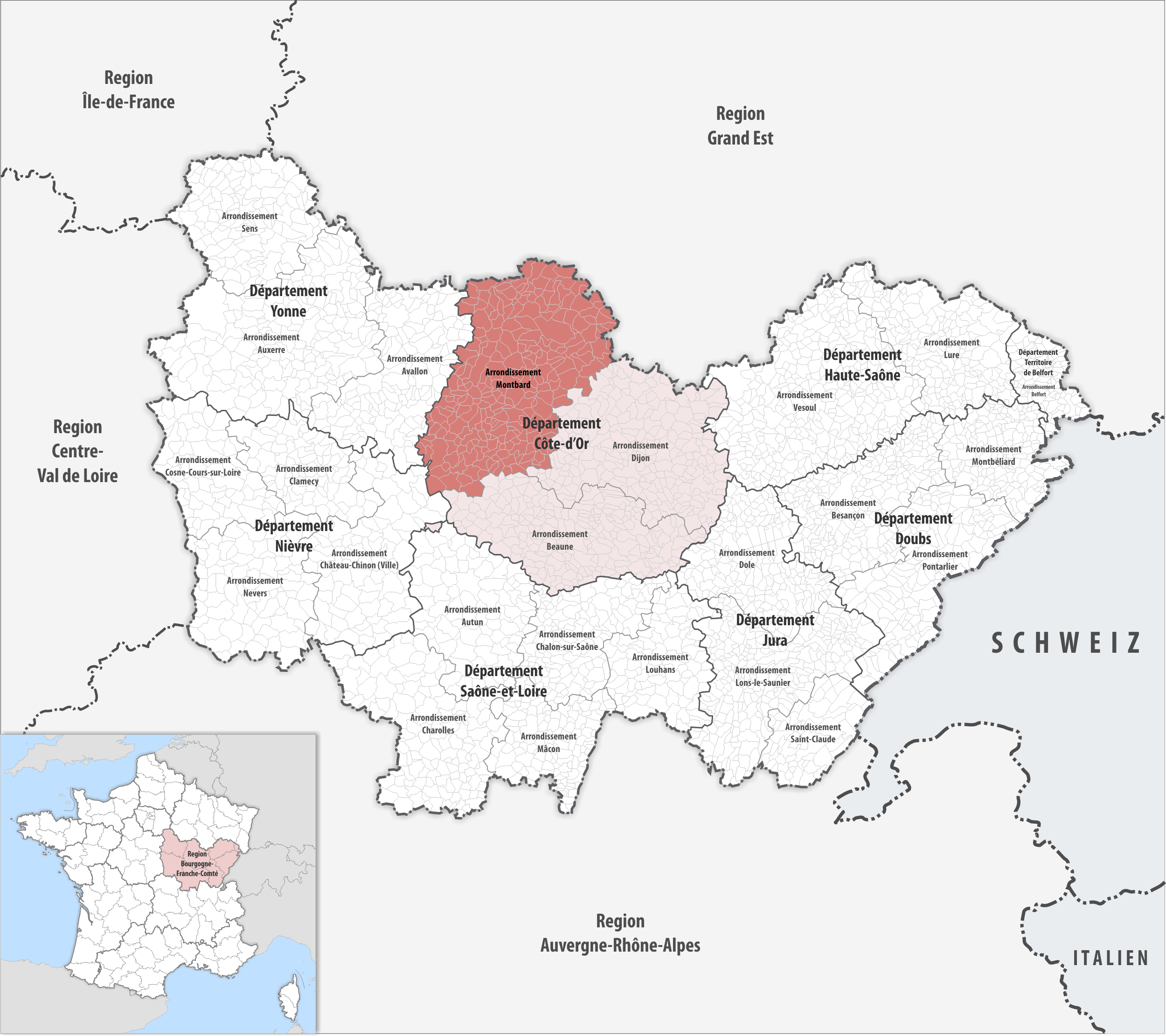 Lage des Arrondissements Montbard